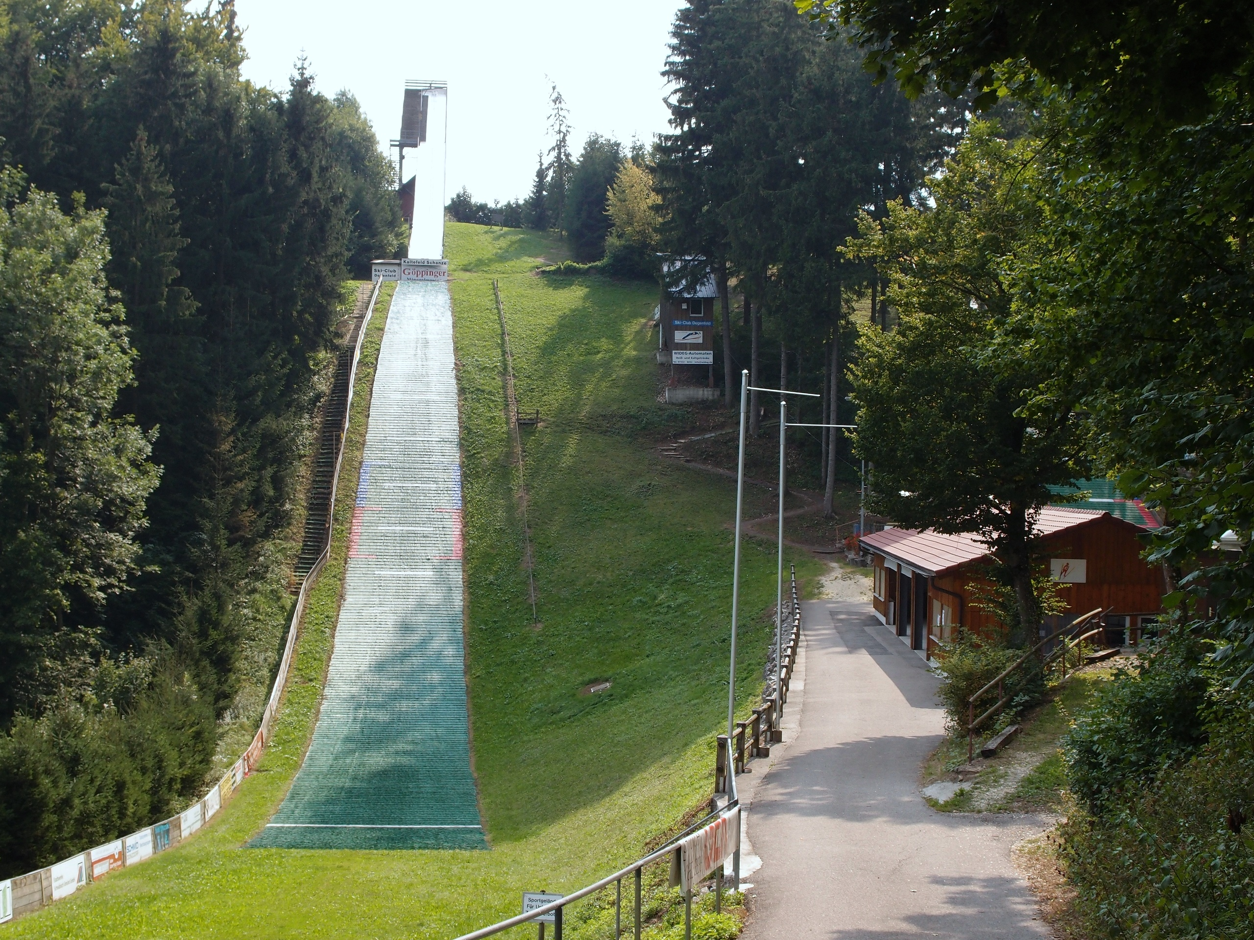 Degenfeld-Schanze „Kaltfeld-Schanze“, Schwäbisch Gmünd